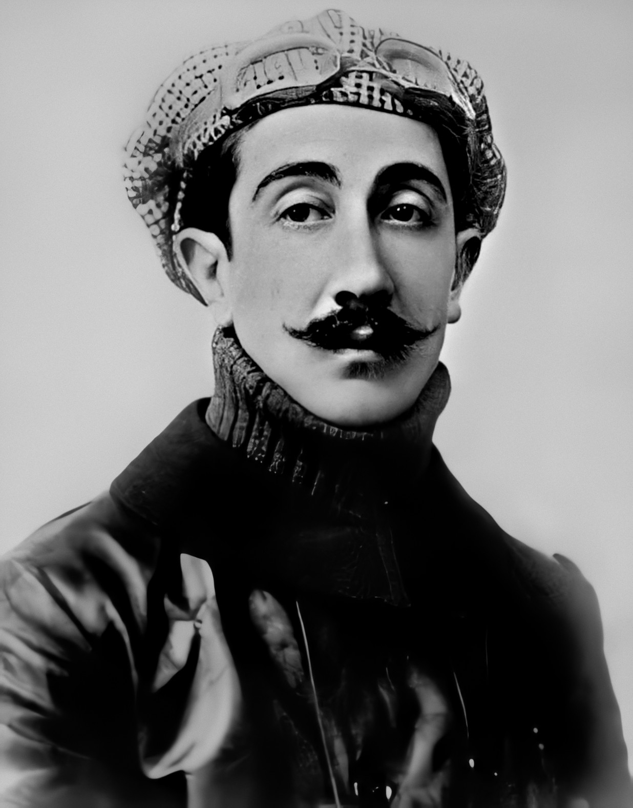 El teniente 1.º Luis Alejandro Bello Silva​ (Santiago, 27 de abril de 1889-desaparecido el 9 de marzo de 1914) fue un aviador chileno que se extravió en 1914, mientras efectuaba una prueba necesaria para obtener el título de piloto militar. Hasta el día de hoy, se desconoce el paradero de él y de su aeronave.